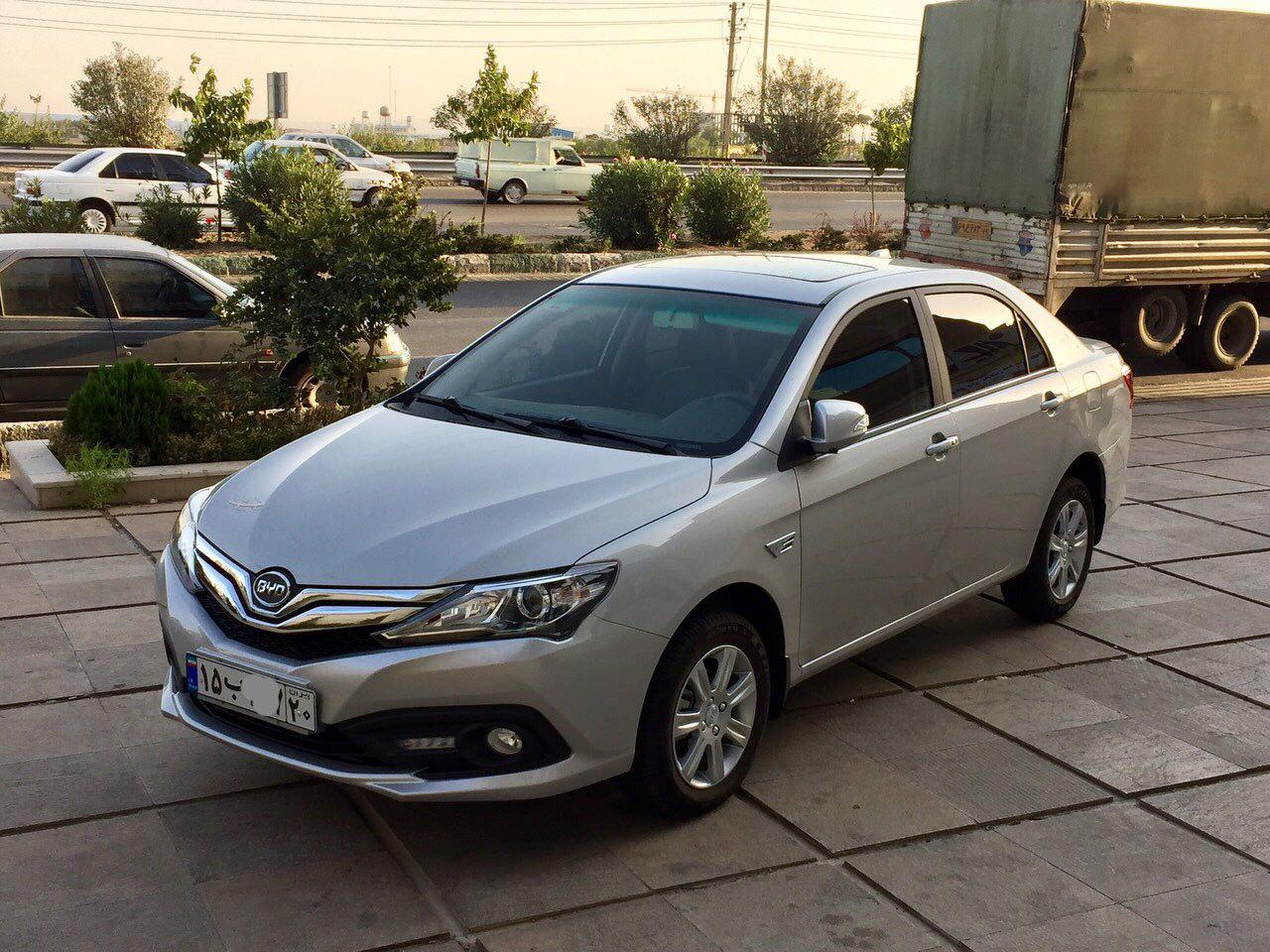 نمای جلوی F3